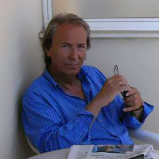 José Luis Miranda Roldan